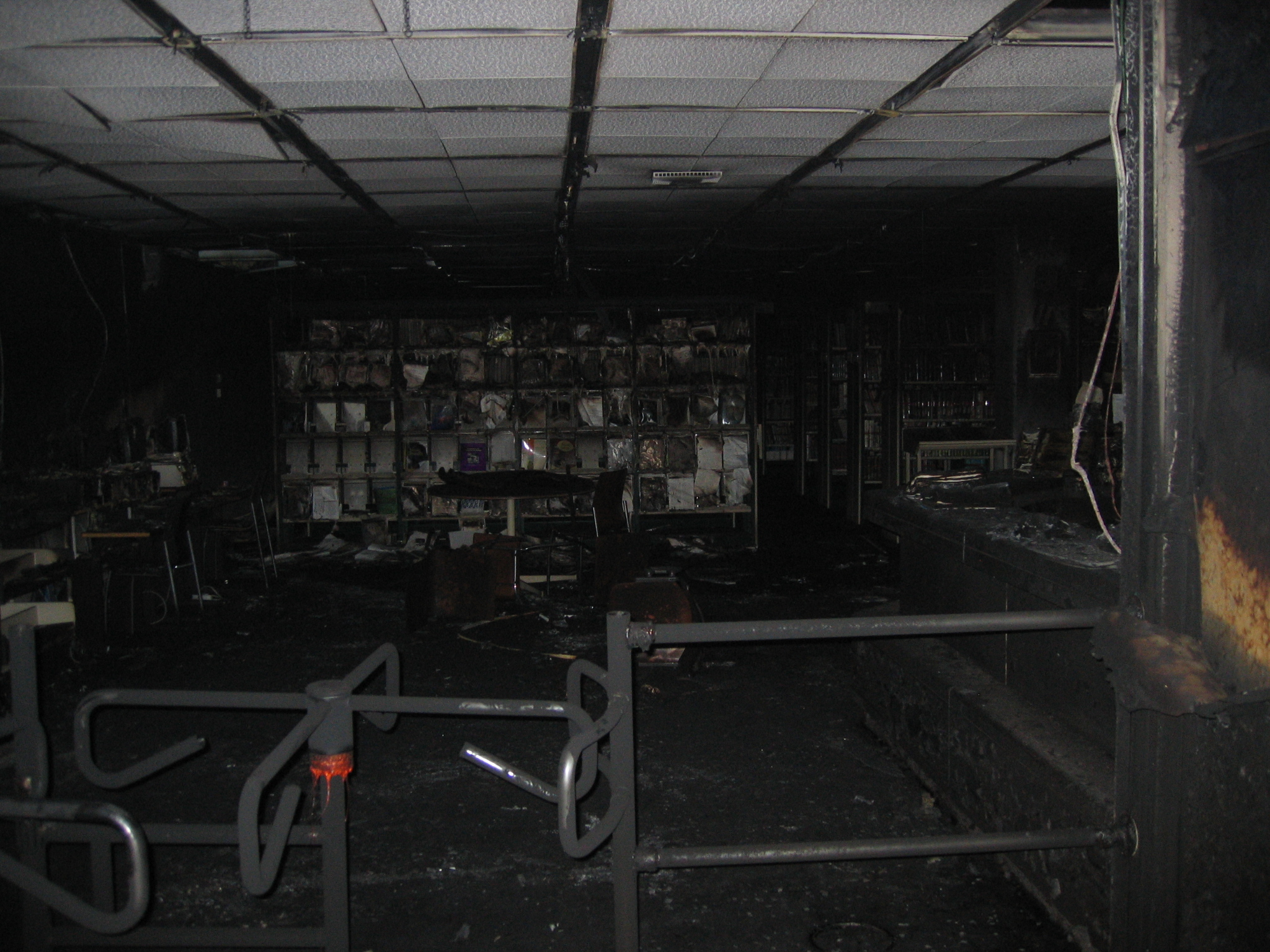 Brand an der Wirtschaftsuniversität Wien (13./14. Dezember 2005)